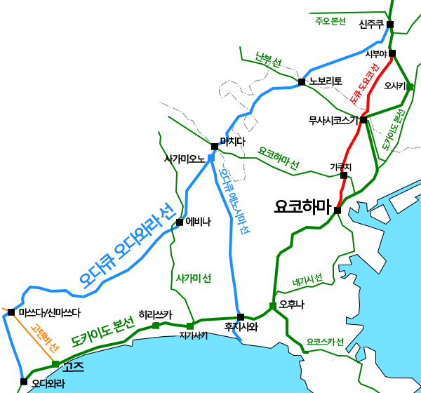 소냔 지방의 철도 경쟁 구도